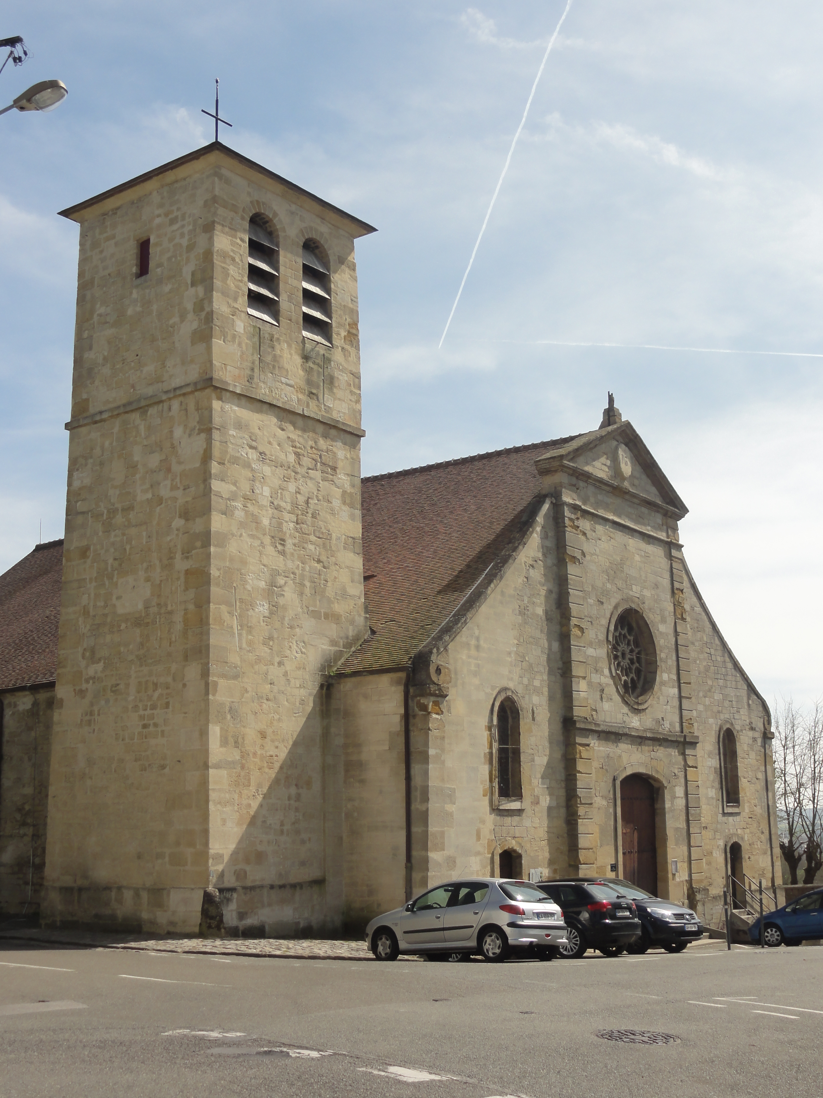 Église Saint-Nicolas de Meulan - voir titre.